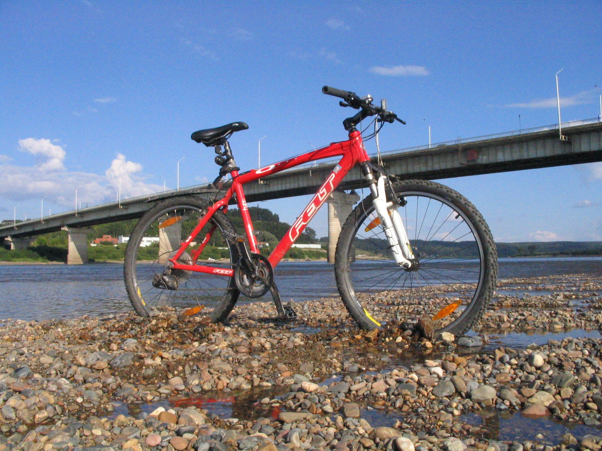 Felt Q650 bicycle on Tom river, Siberia. RU: Велосипед Felt Q650 на берегу Томи в Томске